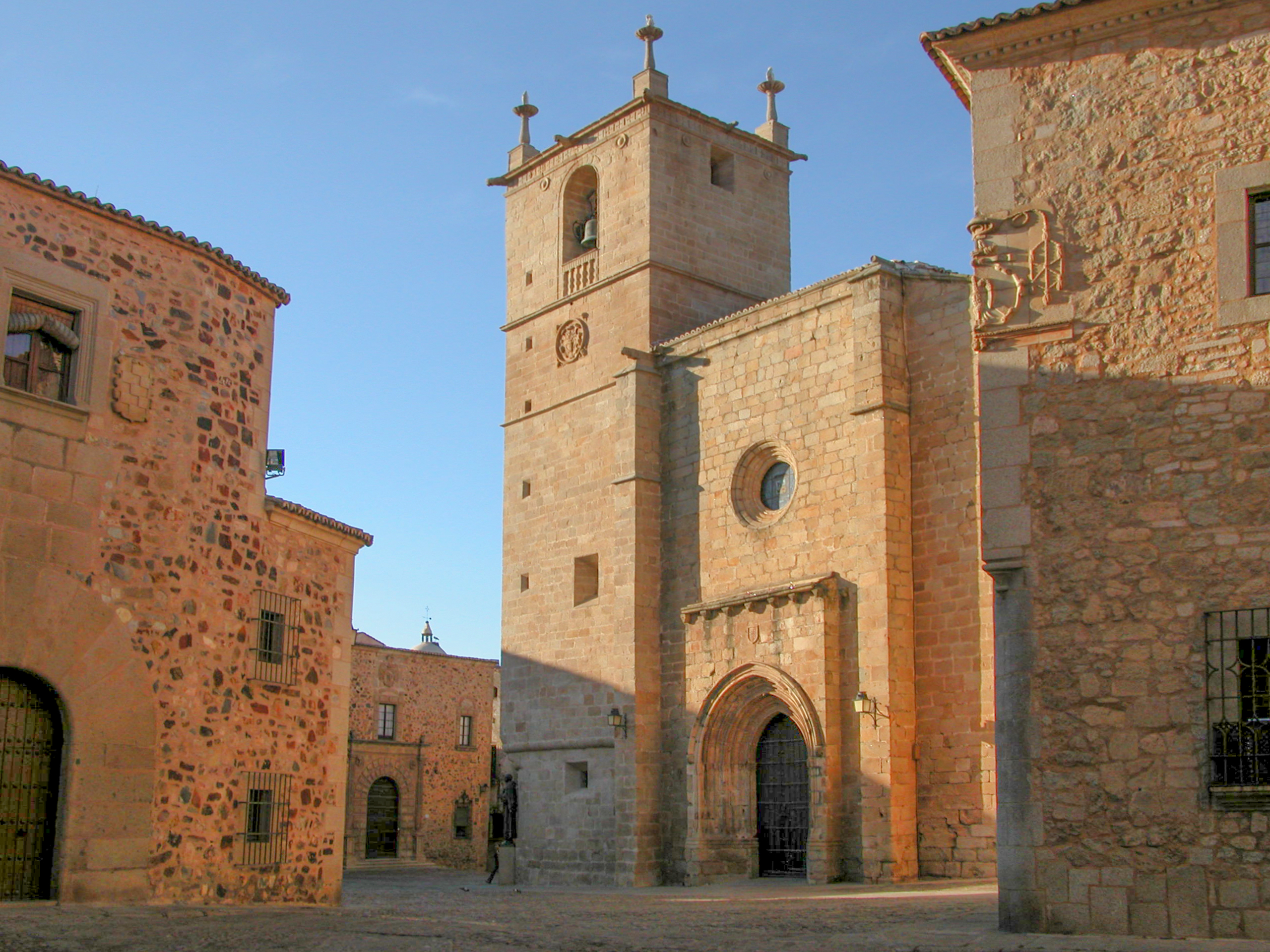 Vista del casco antíguo de Cáceres